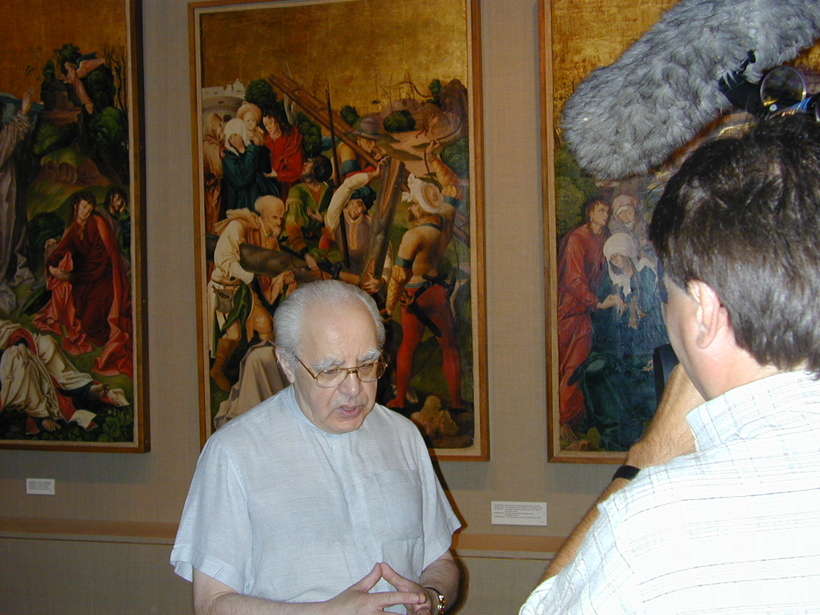 A Keresztény Múzeum Cséfalvay Pál protonotárius kanonokkal, Rafael Balázs fényképe